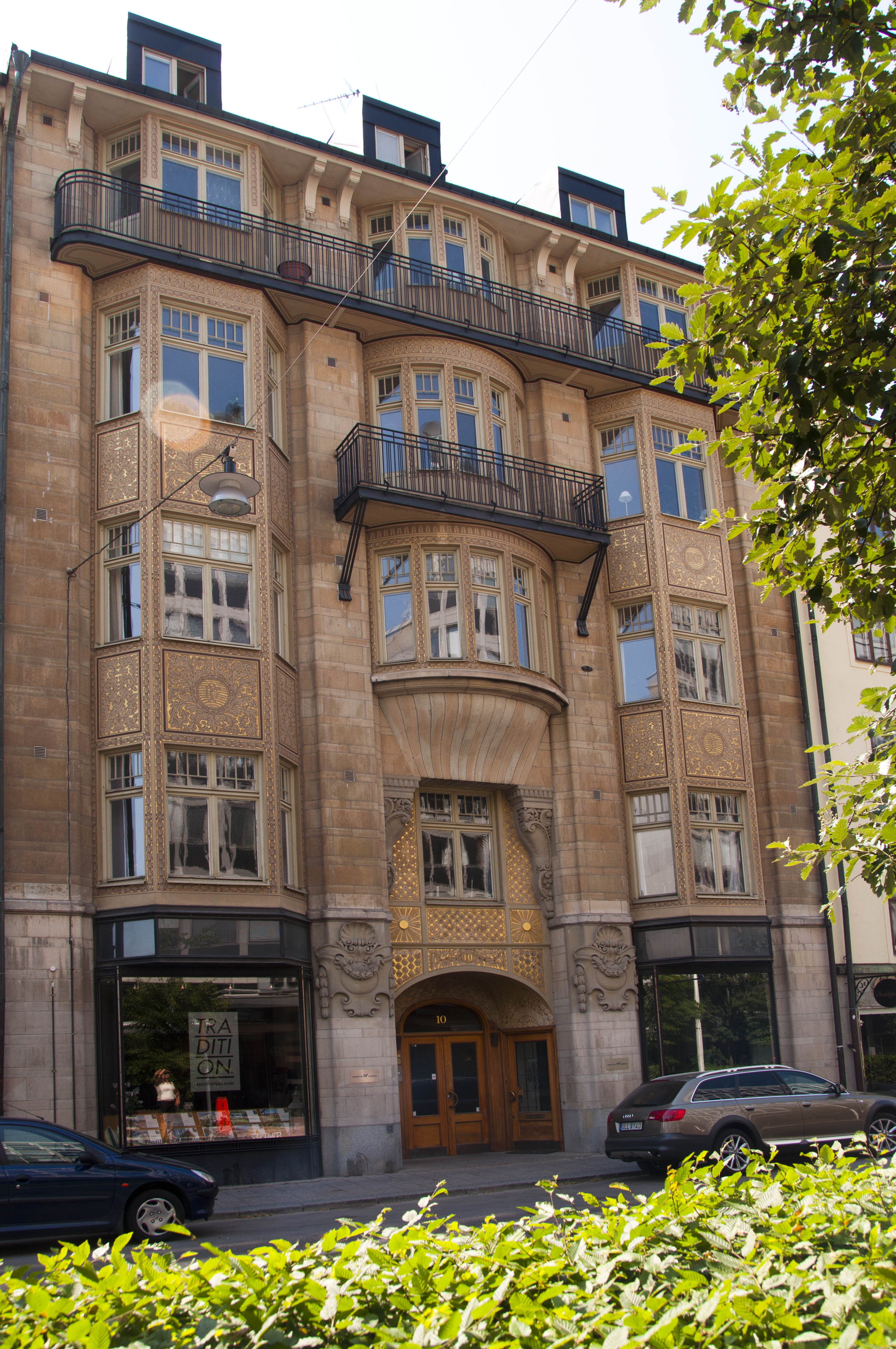 Storgatan 10, Stockholm. Byggt 1905-1906.